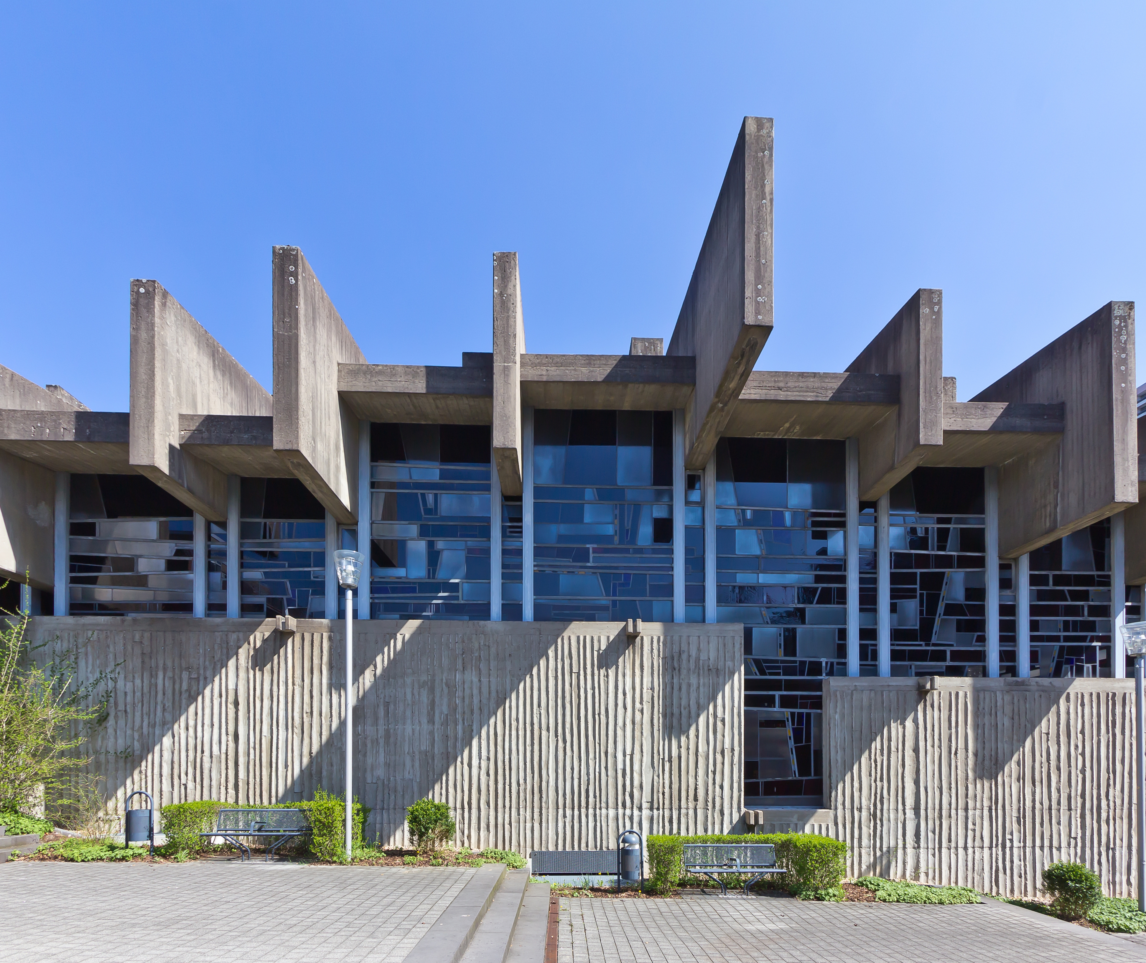 Kirche Johannes XXIII., Katholische Hochschulgemeinde Köln